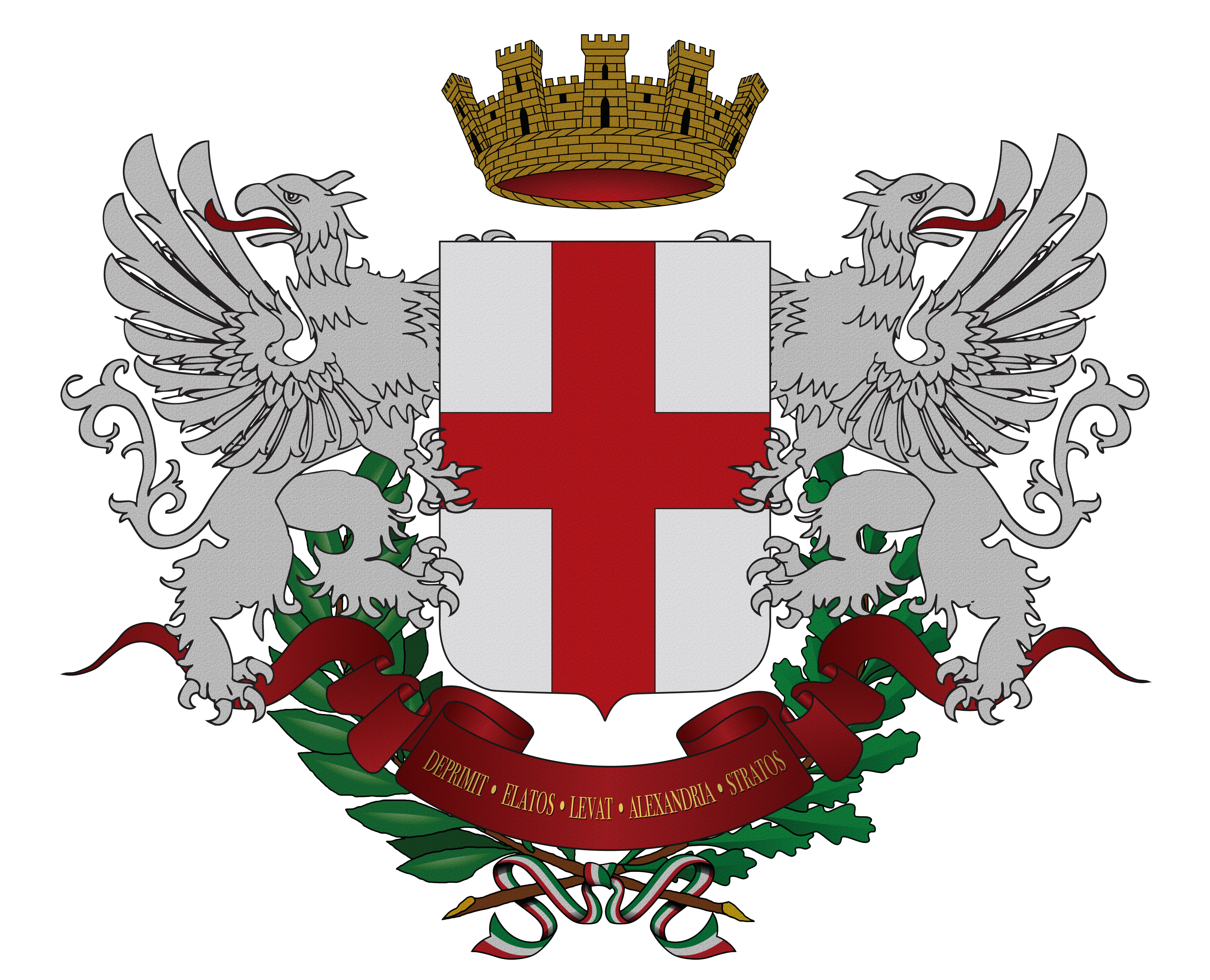 Riproduzione grafica dello stemma del Comune di Alessandria. Descrizione araldica: d'argento alla croce di rosso, circondato da due rami di quercia e d'alloro, annodati da un nastro dai colori nazionali; sostegni: due grifoni al naturale controrampanti, con le teste rivolte e le ali spiegate;motto: "Deprimit Elatos Levat Alexandria Stratos"; corona da Città. Il motto si traduce con: "Alessandria umilia i superbi ed esalta gli umili"